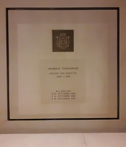 Grab von Bischof Heinrich Tenhumberg in der Bischofsgruft des Domes zu Münster/Westfalen, Deutschland